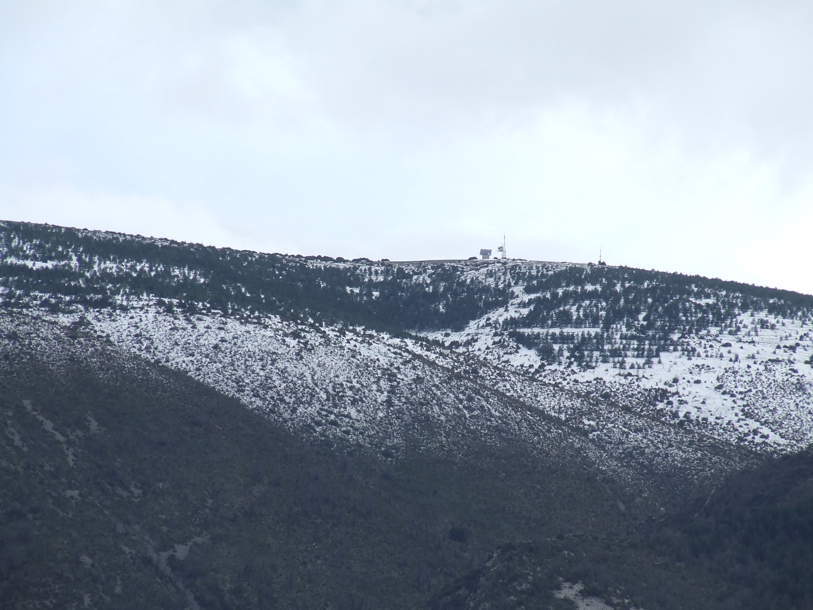 El cim de Sant Alís des de Sant Esteve de la Sarga (Pallars Jussà)